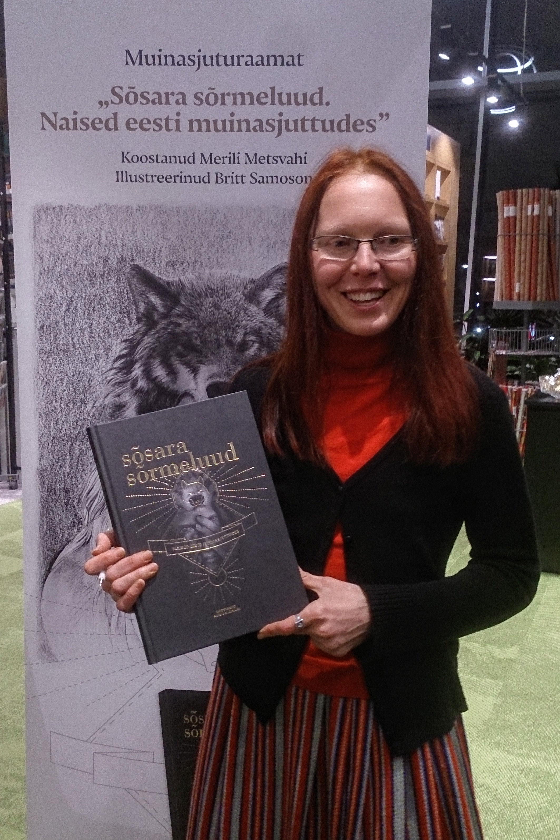 Merili Metsvahi raamatu "Sõsara sõrmeluud" esitlusel 12.12.2018